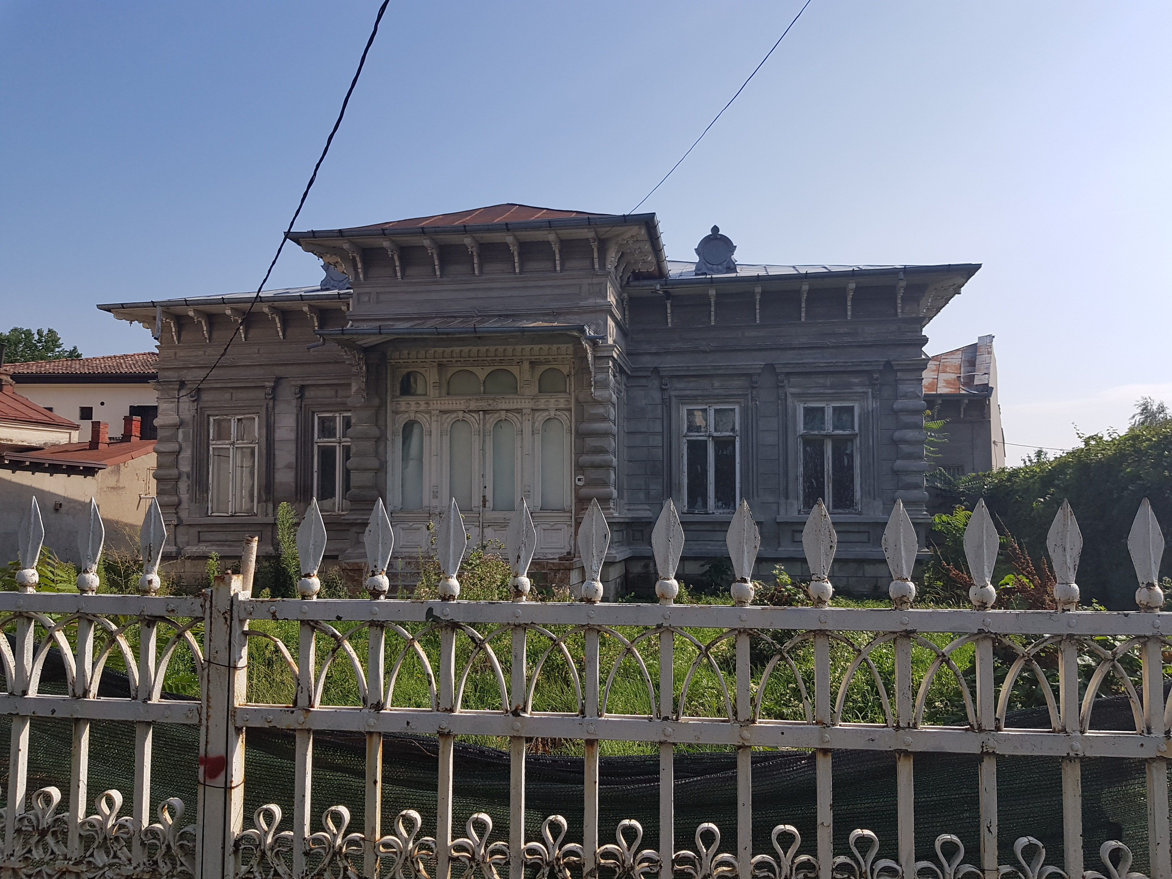 Casa Chirițescu